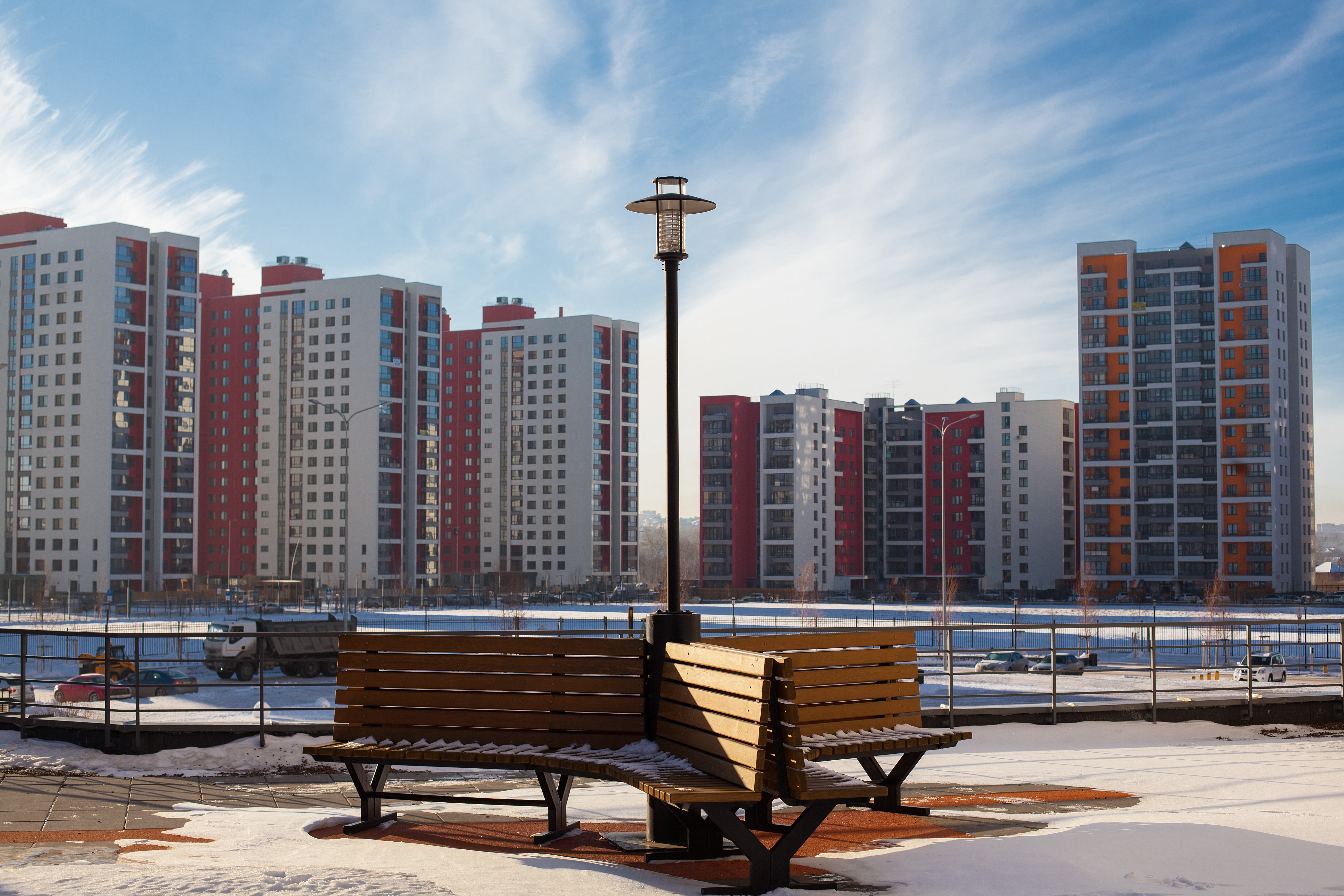 Микрорайон «Европейский» в Тюмени